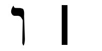 hebrew letter vav